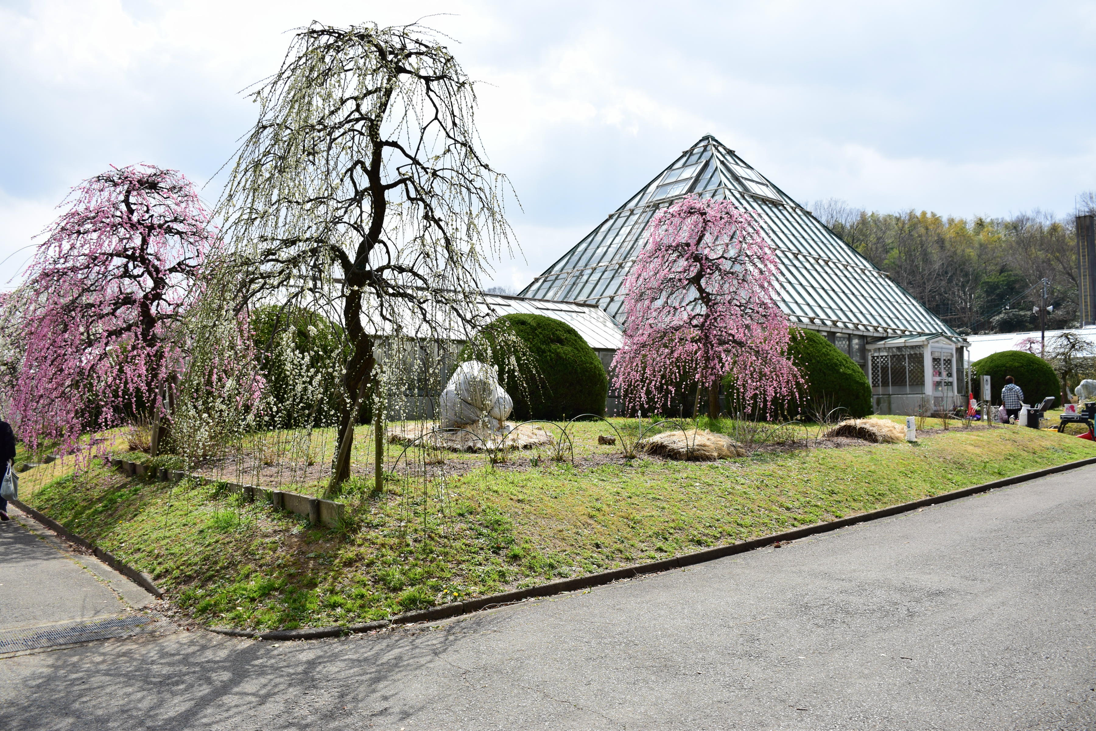 名古屋市農業センター